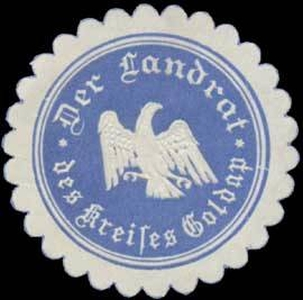 Siegelmarke des Landrats des Kreises Goldap, Provinz Ostpreußen. Wappenadler des Freistaats Preußen (Zeit der Weimarer Republik)